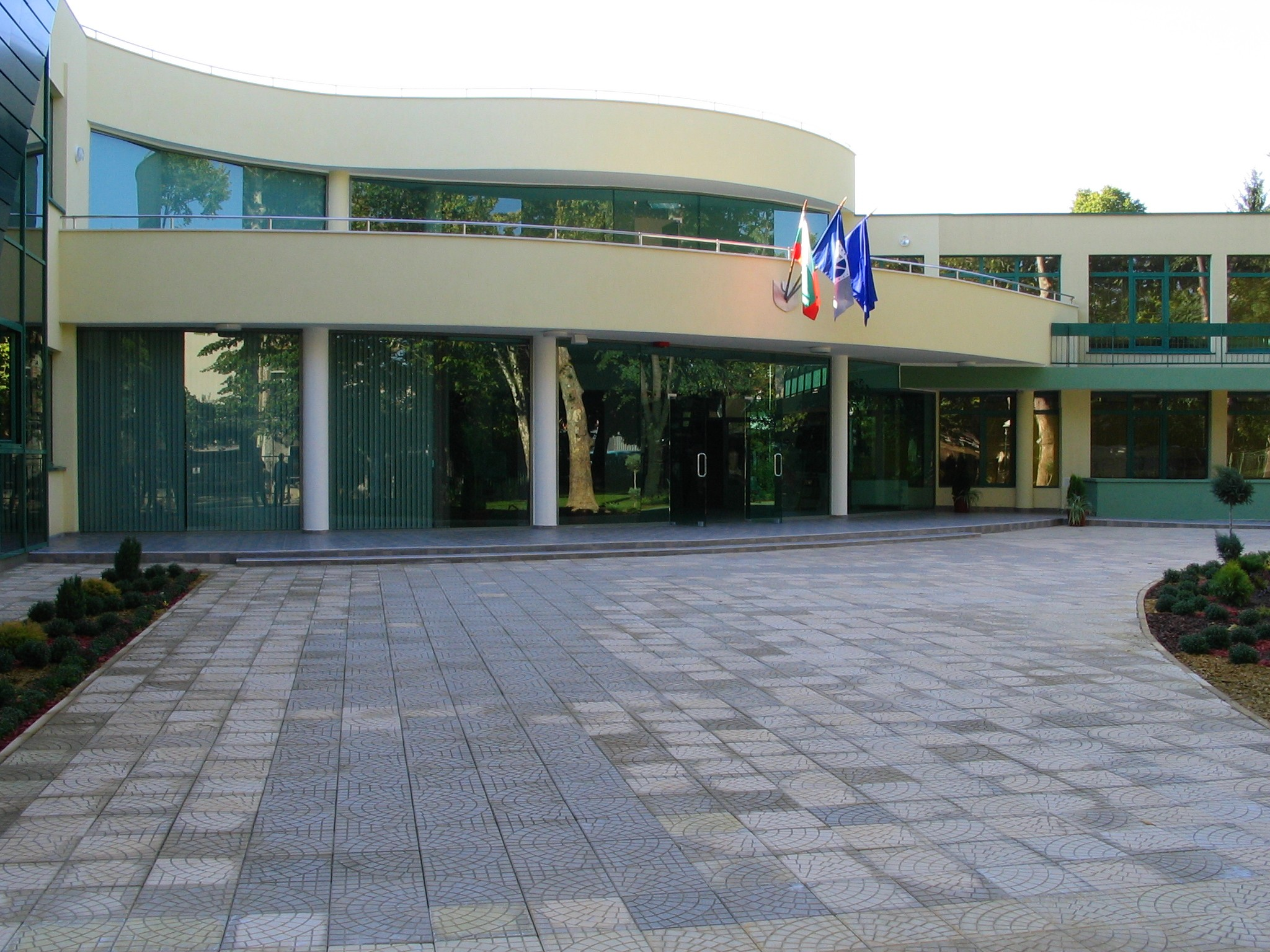 ЕВУИМ Пловдив